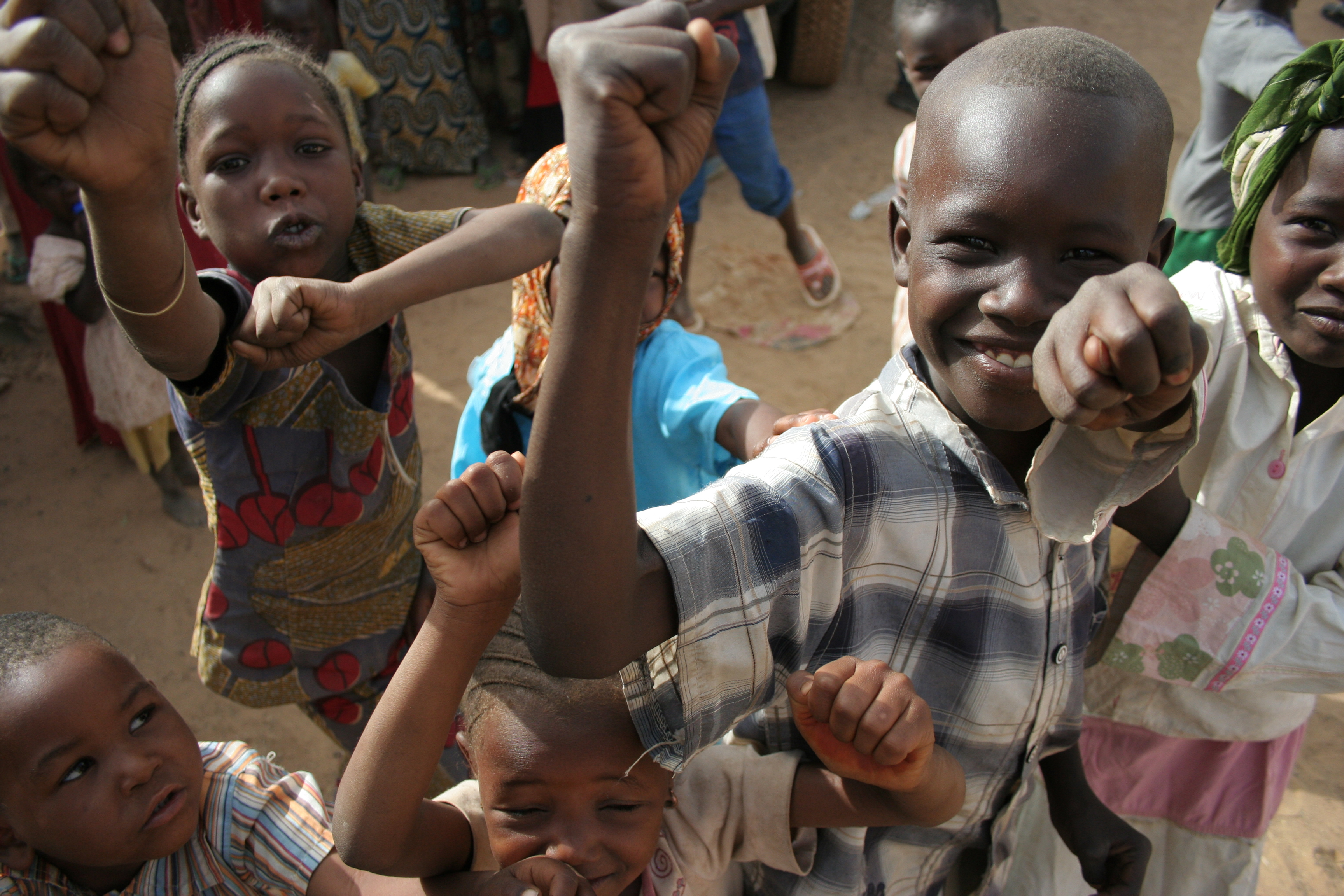 Kids in Tanout, Niger